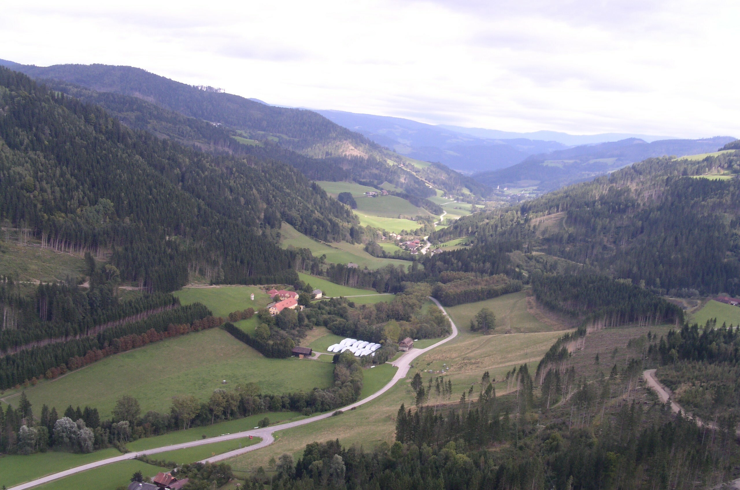 Luftbildaufnahme Metnitztal - Zwatzhof Richtung Friesach